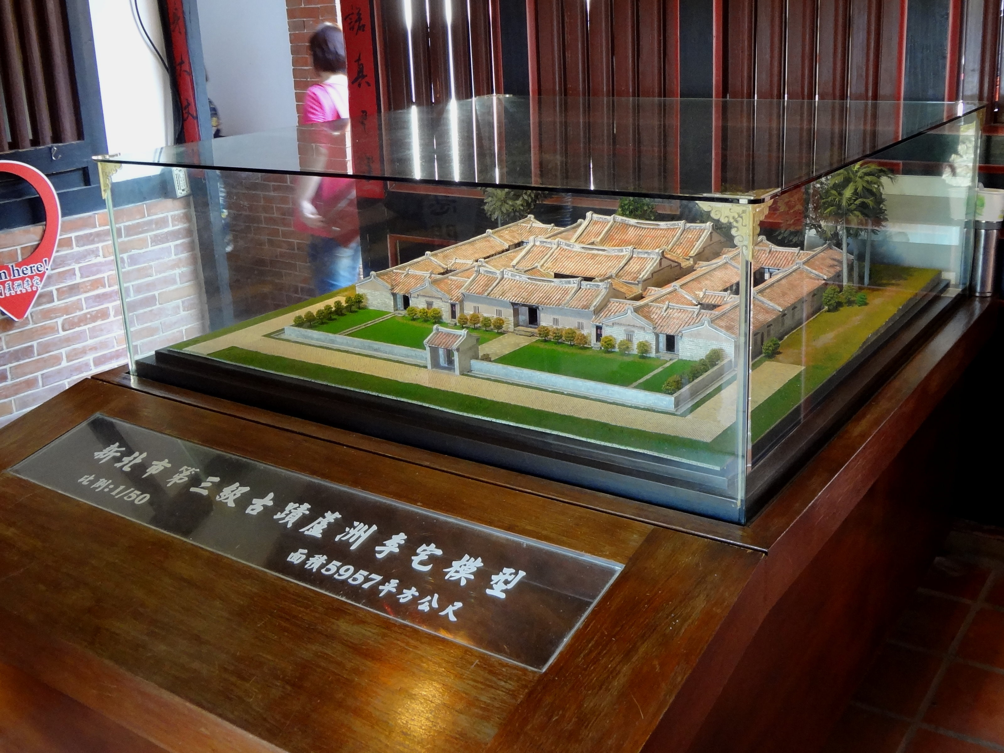 蘆洲李宅比例模型，比例為五十分之一。